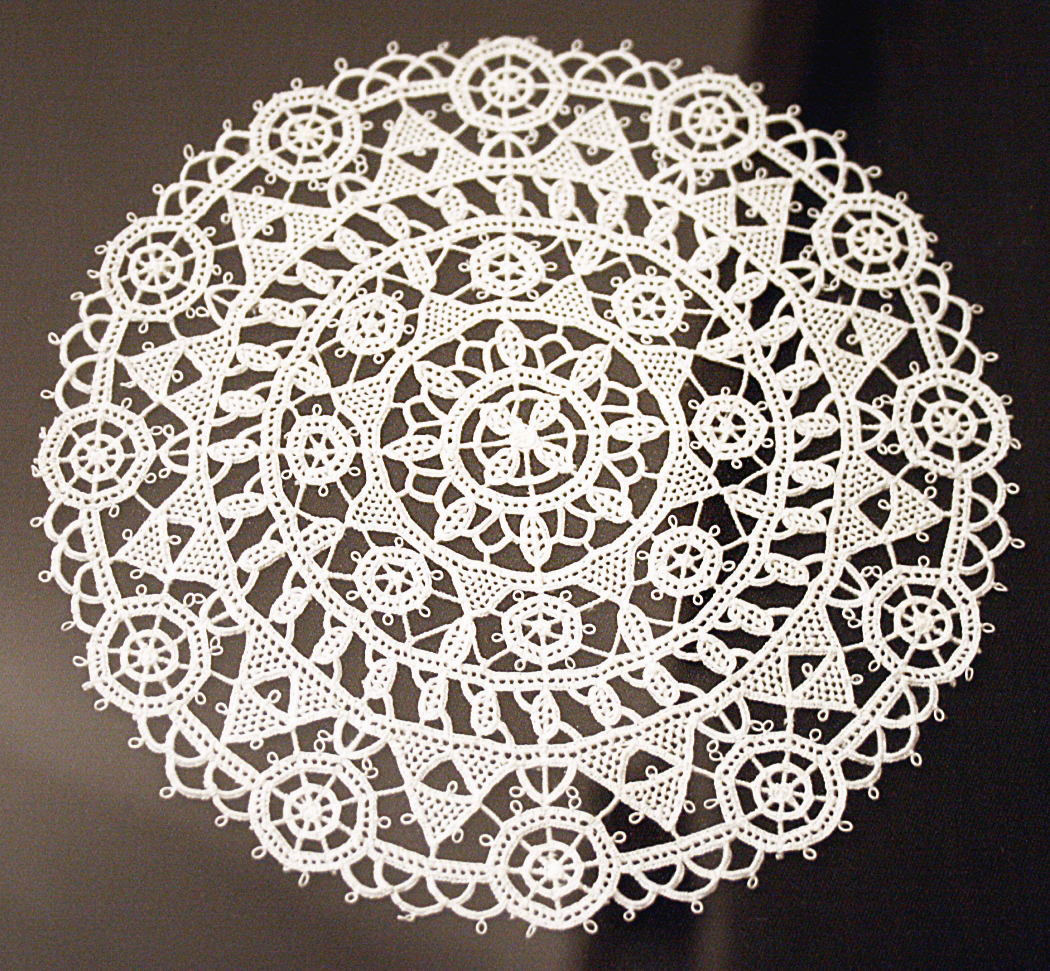 Paška čipka, koja se šije na otoku Pagu, Croatia